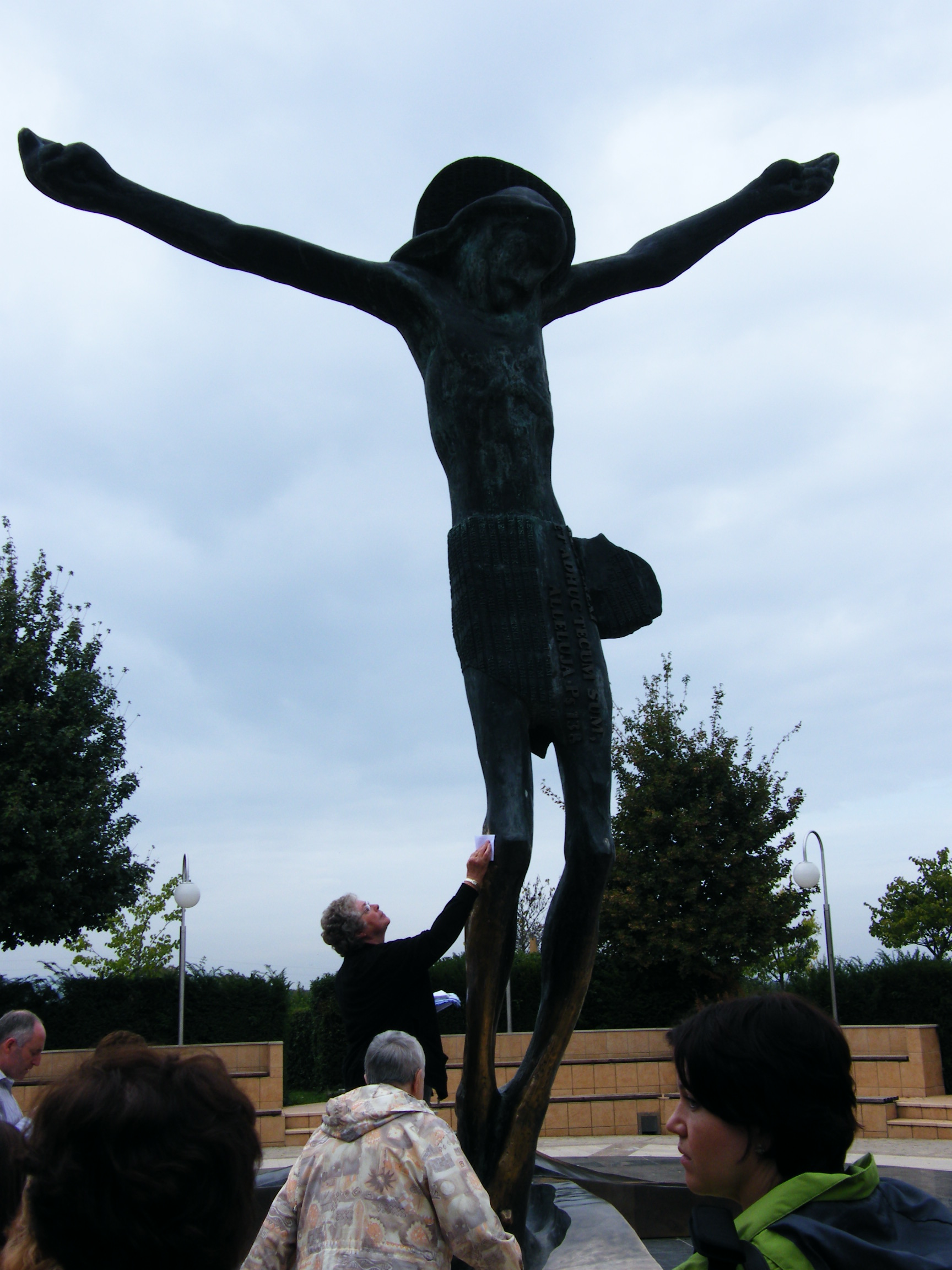 Kobieta zbierająca wodę wypływającą z rzeźby Jezusa w Medjugorje.